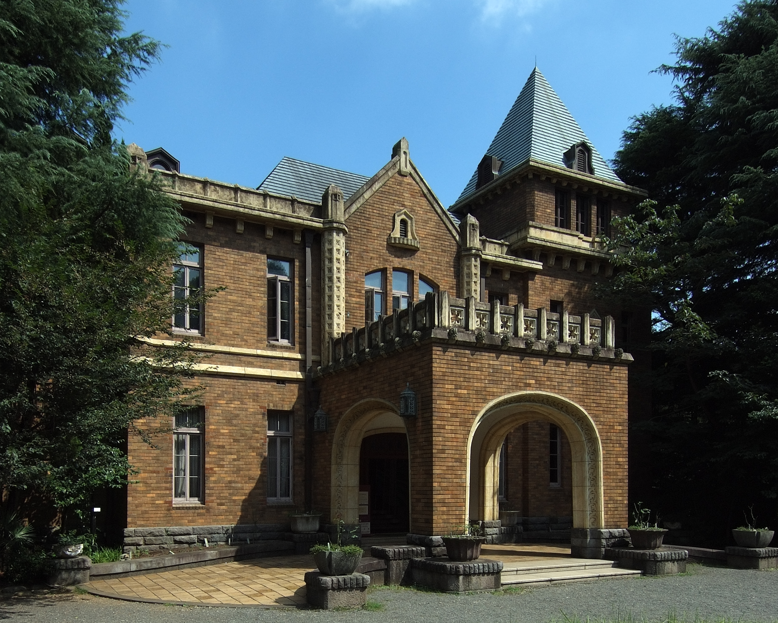 Former Maeda Estate, at Meguro-ku Tokyo Japan, designed by Yasushi Tsukamoto & Teitaro Takahashi in 1929.